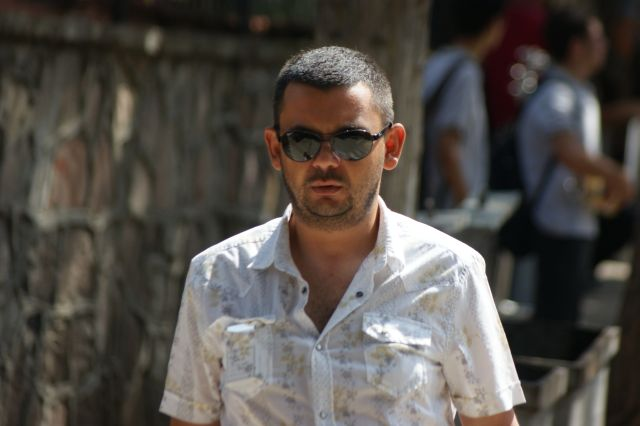 Cengiz Çağatay